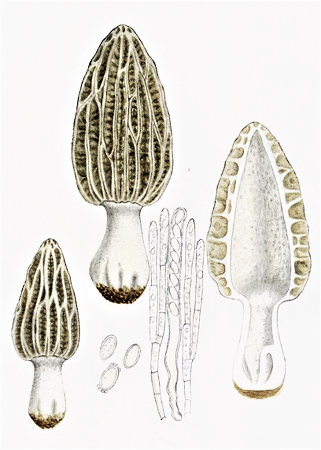 Giacomo Bresadola : Morchella tridentina (1892), laut Index Fungorum von 2015 wieder gültiger Spezies-Name, Synoym nach M. Kuo ist Morchella frustrata